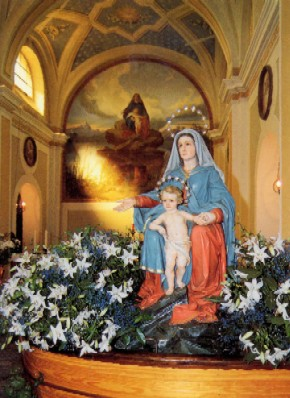 Piemontèis: Statua dla Madona del lac